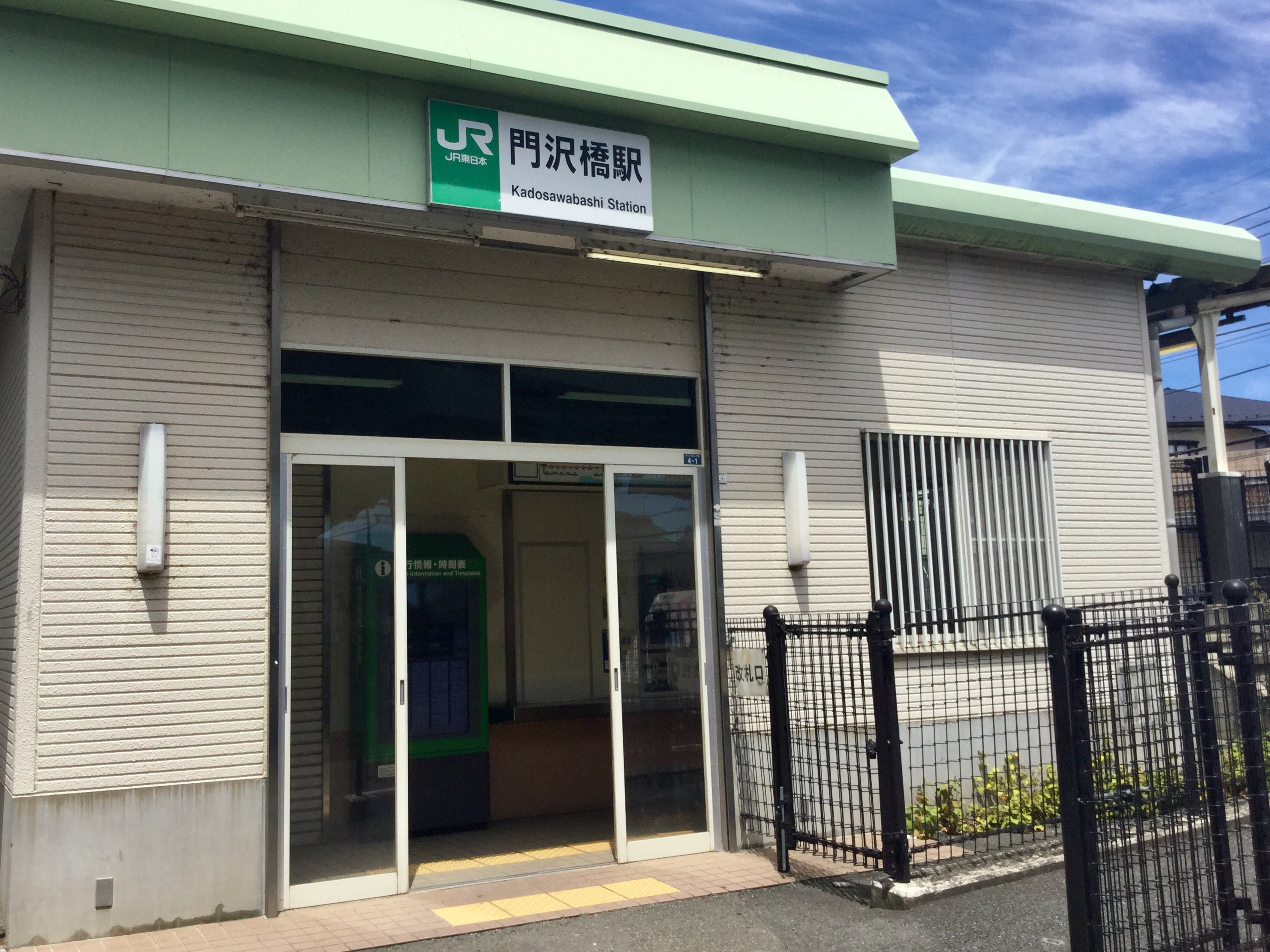 JR門沢橋駅の駅舎